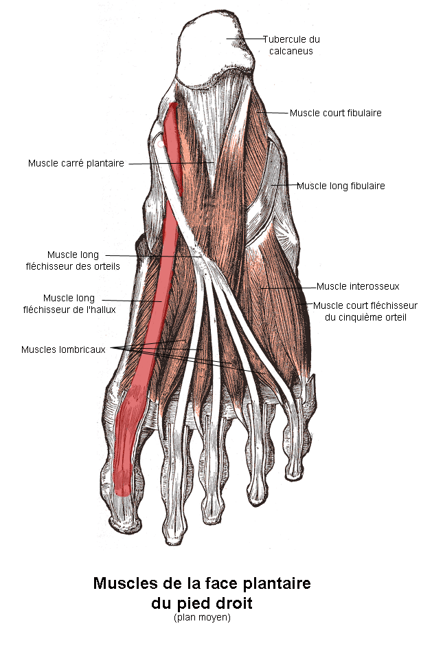 Trajet du tendon du long fléchisseur de l'hallux au niveau de la face plantaire du pied droit